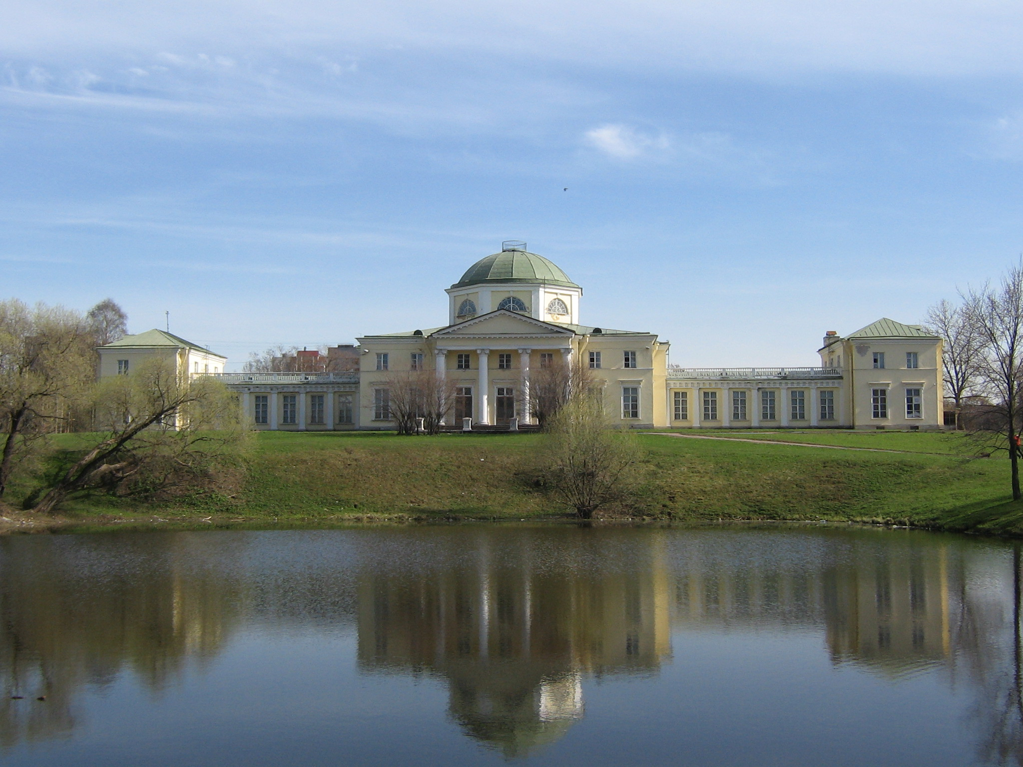 Дача И. Г. Чернышева «Александрино» (Санкт-Петербург, проспект Стачек, 226)